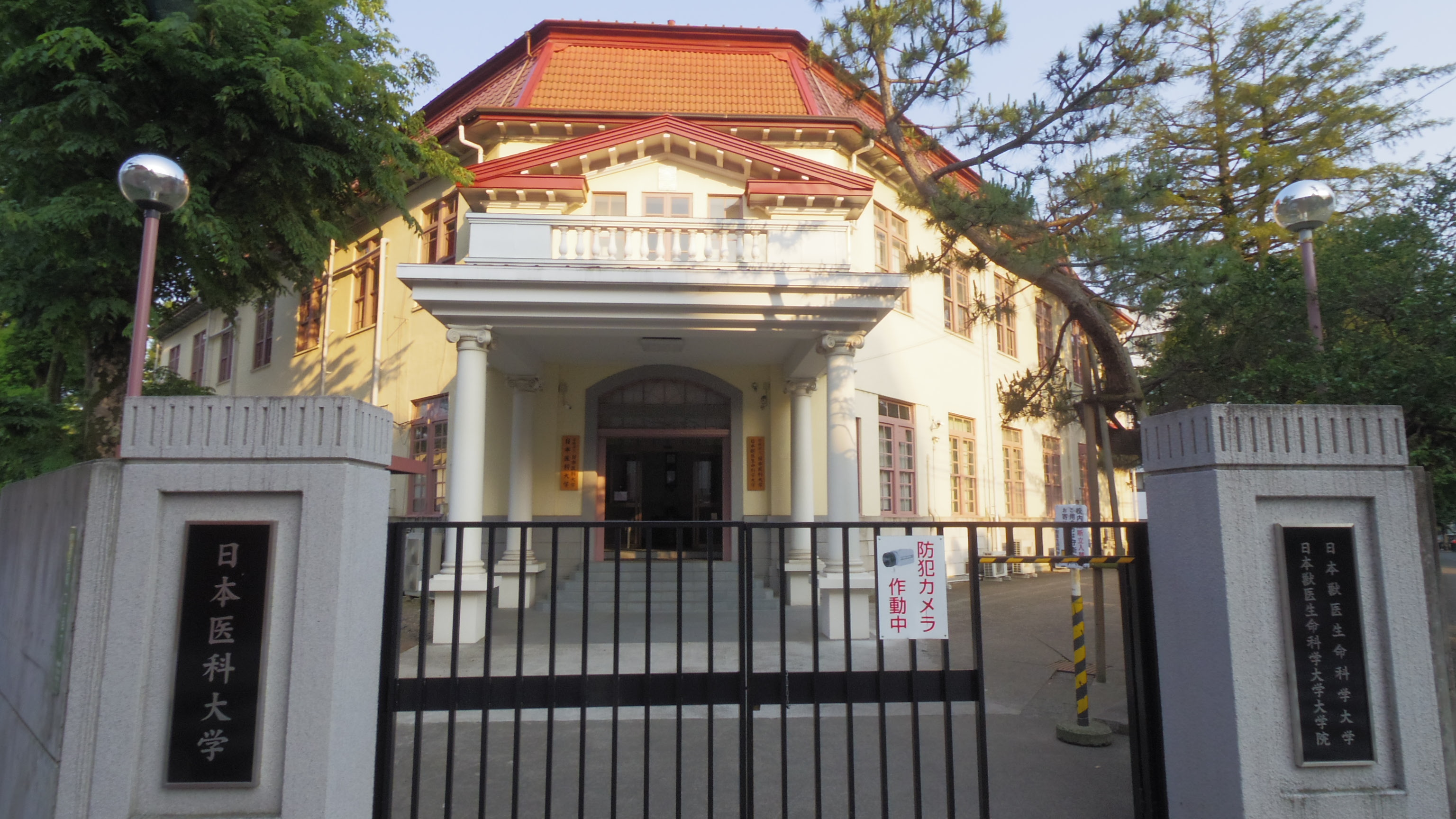 日本医科大学武蔵野校舎・正門（2016年5月22日撮影）